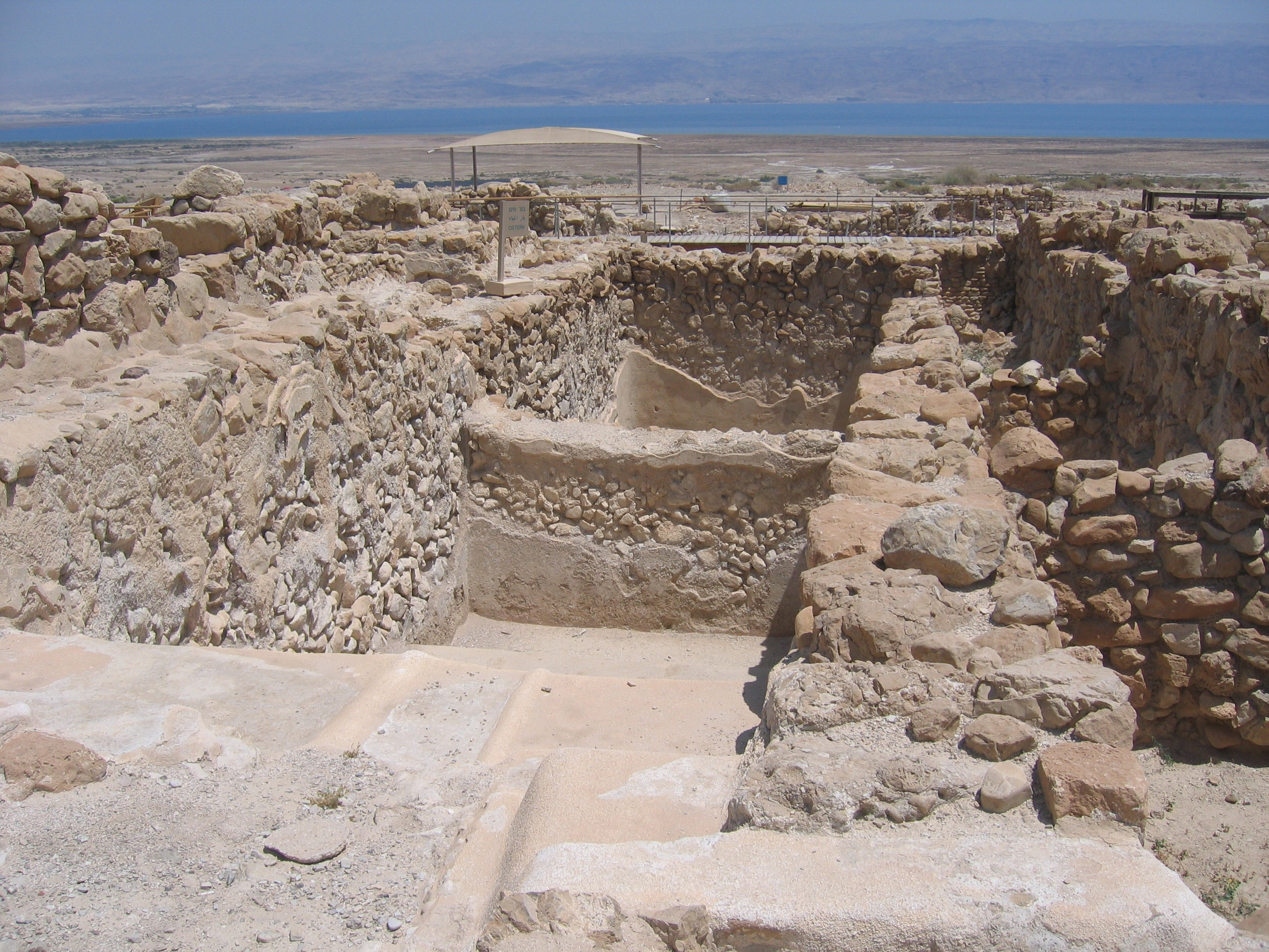 Qumran miqveh sud divisé en deux (locus 56 et 58)